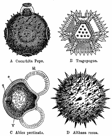 Verschiedene Pollen, public domain Quelle : 10:25, 30. Jul 2004 Magnus Manske 368 x 447 (40.032 Byte) (Verschiedene Pollen, :de:public domain )